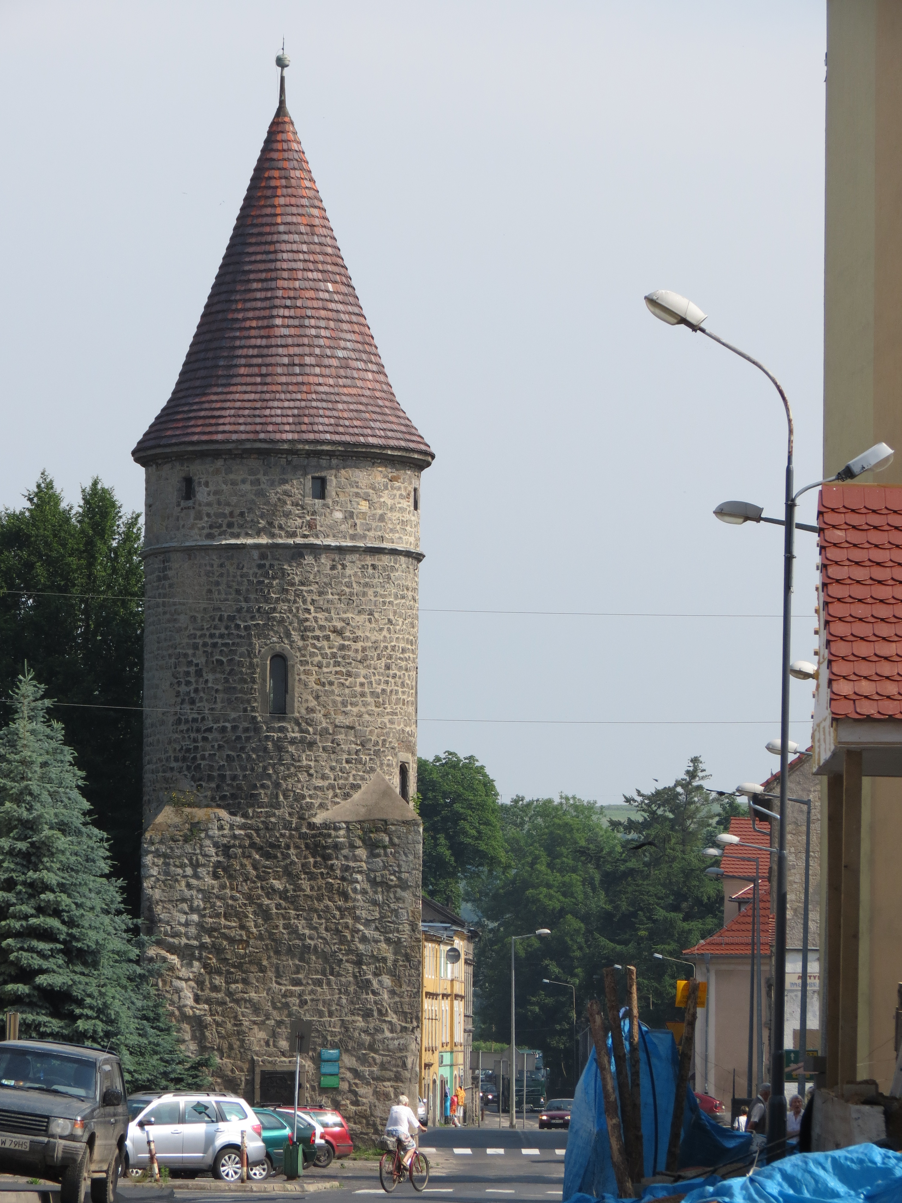 Lwówek Śląski, Baszta Bolesławiecka